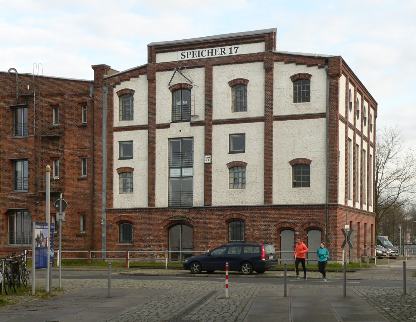 Ehemaliger Speicher am Holz- und Fabrikenhafen am Ende des Hafenbeckens